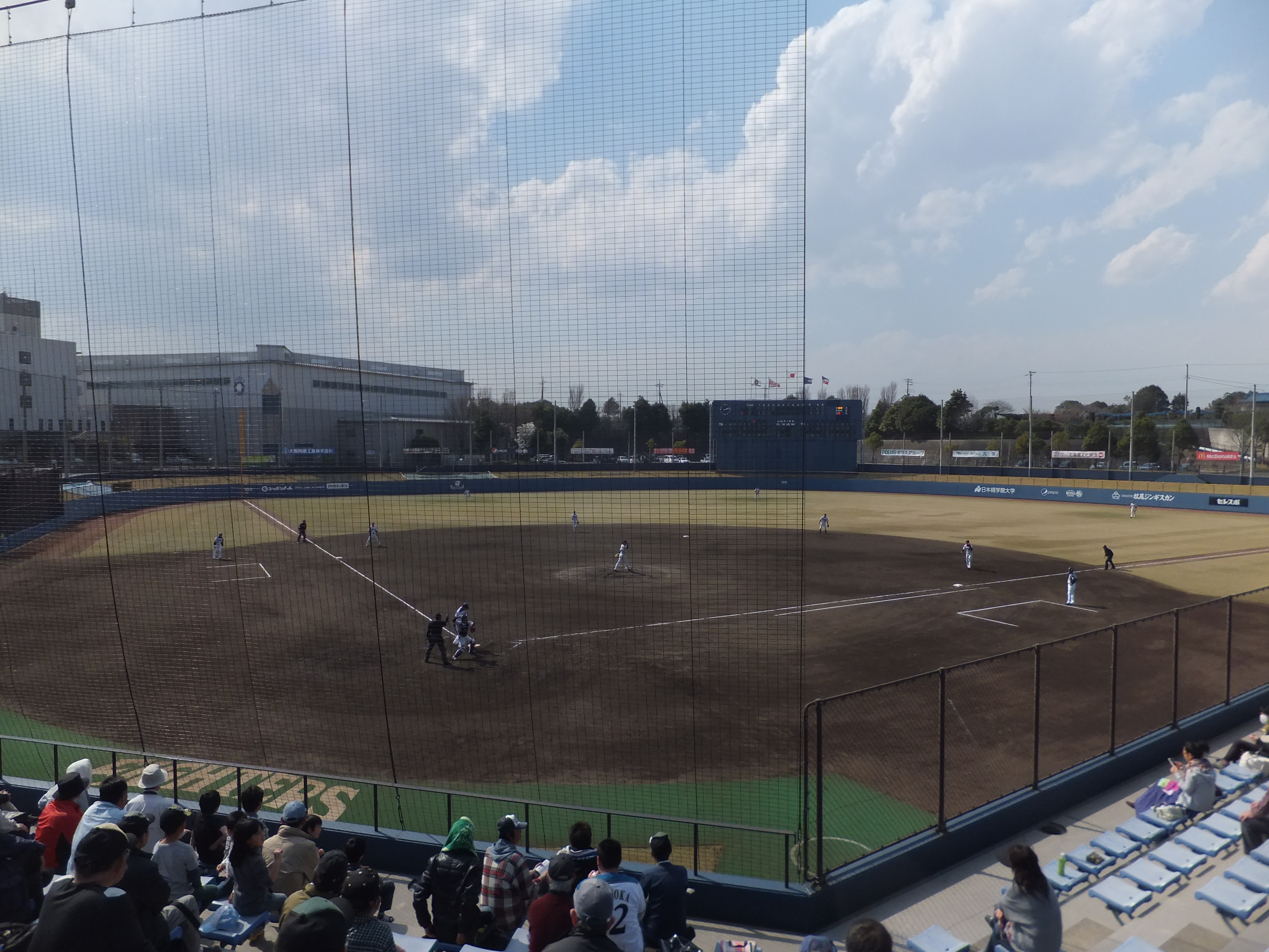 ファイターズスタジアム球場内。対東京ヤクルト戦の試合中